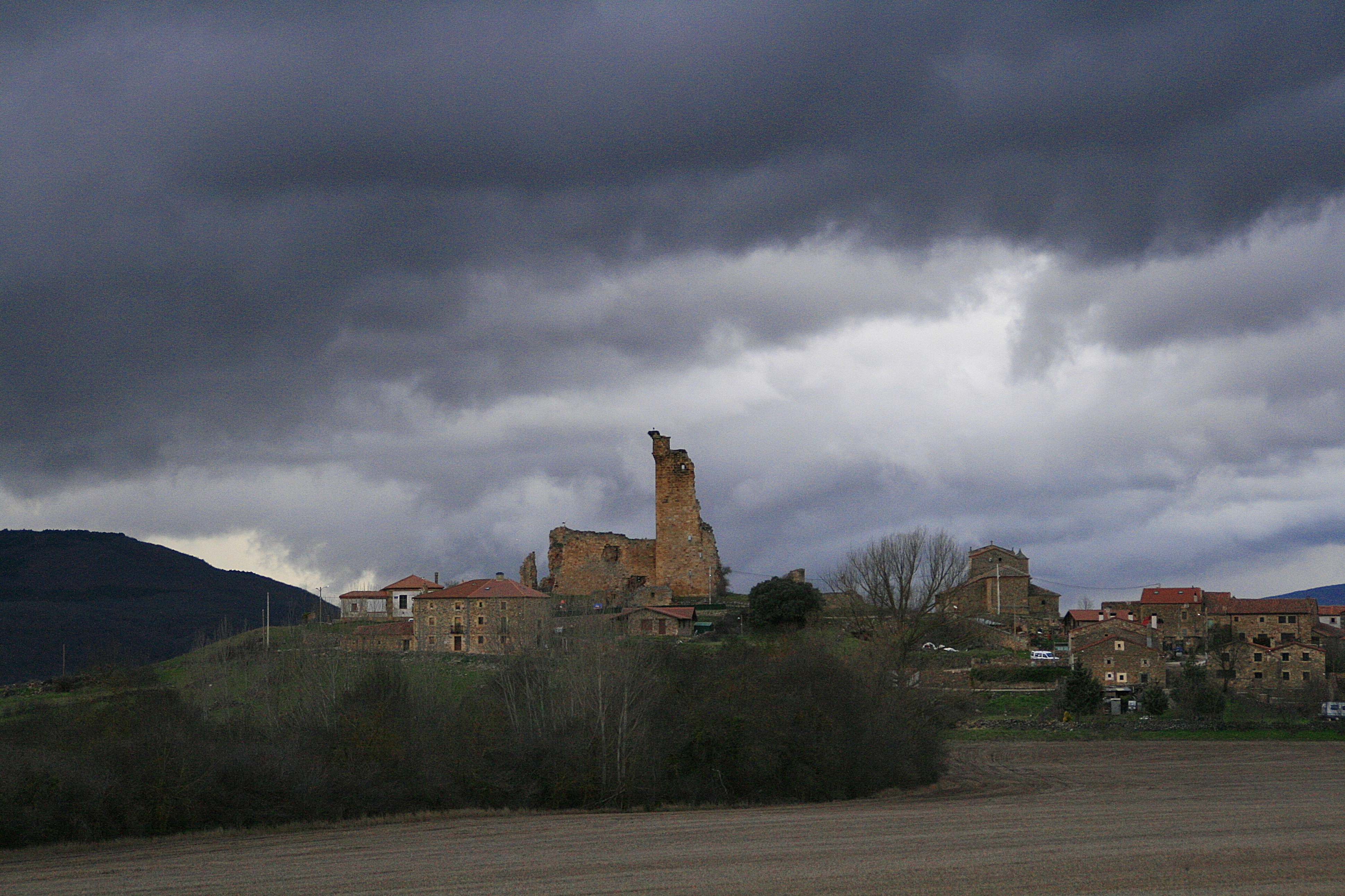 Hinojosa de la Sierra.Soria.